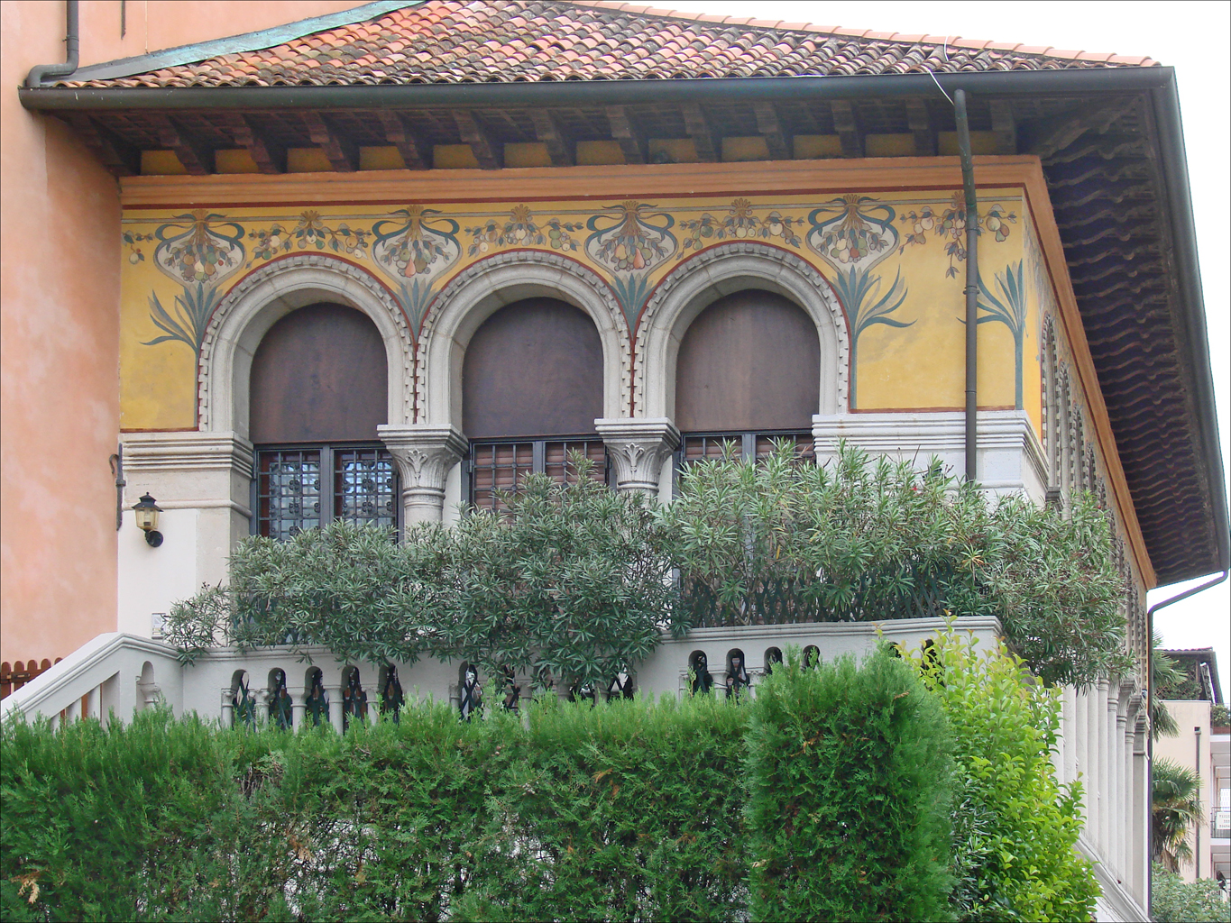 La grande loggia de la villa Otello. La villa Otello a été conçue par l'architecte Domenico Rupolo en 1905. Elle intègre certains décors de style Liberty comme le portail en fer forgé ou des décors floraux. Mais son architecture est inspirée par l'art byzantin et l'art gothique. La villa a été divisée en appartements d'habitation. La villa est située via Dandolo / via Lepanto Article Wikipedia sur Umberto Bellotto Description de la villa Romanelli ________________ Le Lido de Venise est une bande étroite de terre sablonneuse de 12 Km de long qui sépare la lagune de Venise de la mer Adriatique. Au 19ème siècle, le Lido commence à être fréquenté pour les bains de mer en raison de la beauté de ses plages. Le Grand Hôtel des Bains est ouvert en 1900 (il est actuellement en rénovation) et accueille des clients illustres (écrivains, aristocrates, artistes,..) comme le Grand Hôtel Excelsior, construit dans le style néo-mauresque, ouvert à proximité quelques années plus tard, en 1908. A la demande de Mussolini, le Palais du cinéma ne sera construit dans le style art déco qu'en 1937 à coté de l'Excelsior pour que le festival (Mostra) puisse s'y dérouler dans de bonnes conditions. Concentrées autour de ces palaces, de luxueuses maisons sont édifiées à partir du début du siècle dernier, dans des styles influencés par l'art nouveau (appelé style Liberty en Italie), ou un peu plus tard par l'art déco, mais aussi par l'art byzantin, l'art médiéval, l'art de la Renaissance italienne, l'art oriental ou même par l'art du nord de l'Europe. En raison de la proximité de Venise, les formes et décors vénitiens constituent d'importantes sources d'inspiration des architectes. Il en résulte un ensemble de maisons et d'immeubles dans le style éclectique, avec des éléments de style Liberty, qui ne se rencontre que dans cette région de l'Italie. Article de Wikipedia sur le Lido de Venise